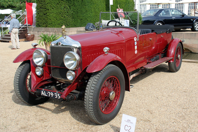 1925 Minerva AC 30HP